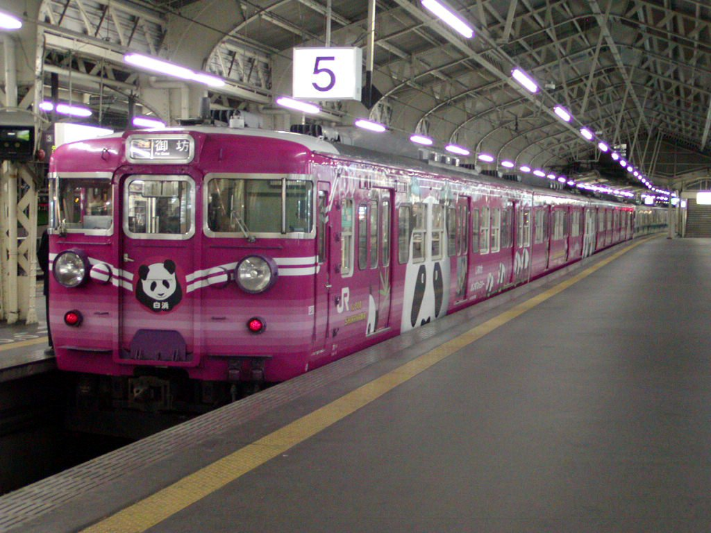 JR西日本 113系パンダ塗装（阪和線天王寺駅）